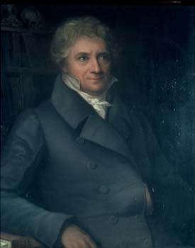 Der deutsche Anatom Ignaz Döllinger (1770-1841)